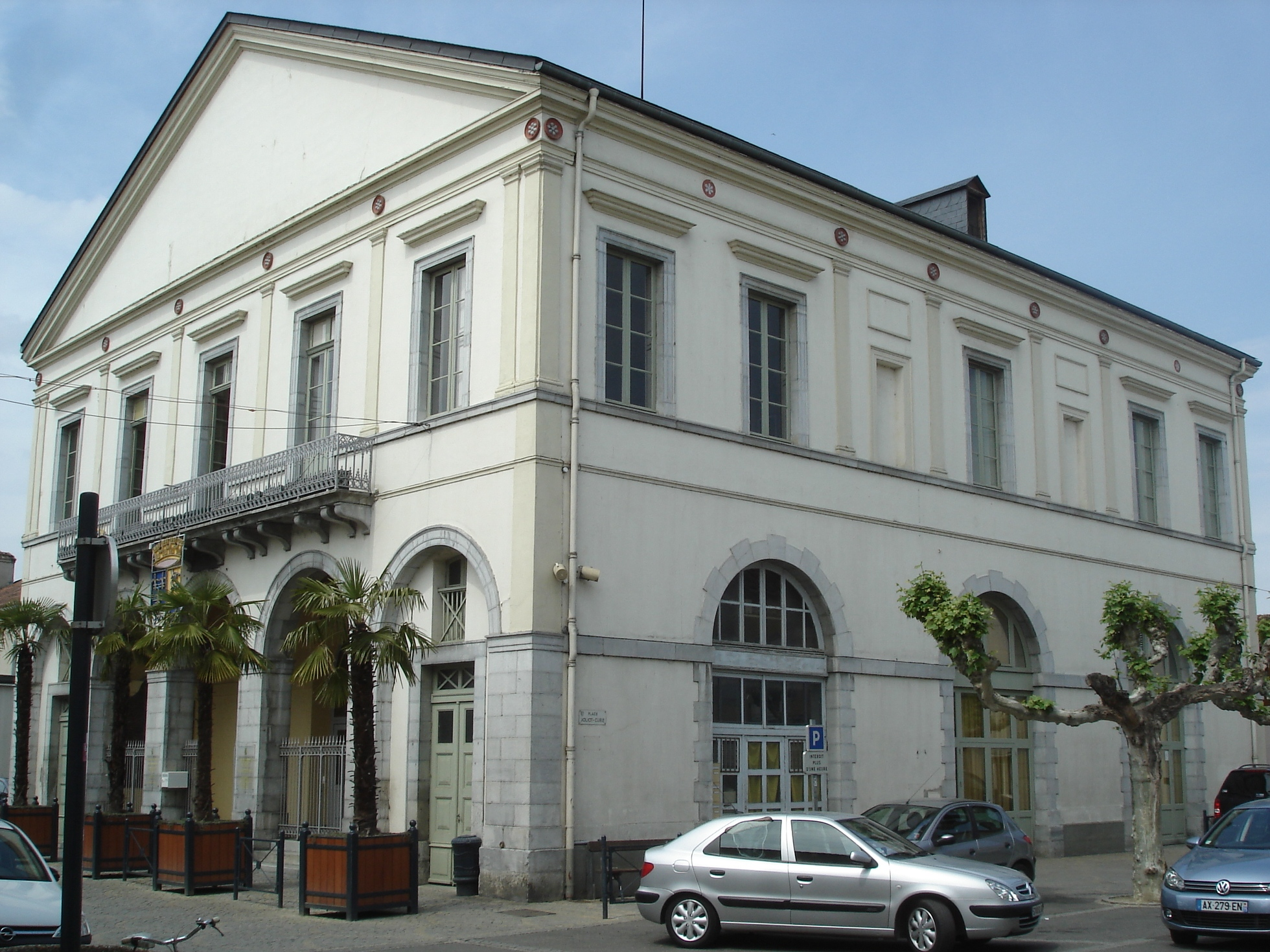 Mairie de Maubourguet, Hautes-Pyrénées, France